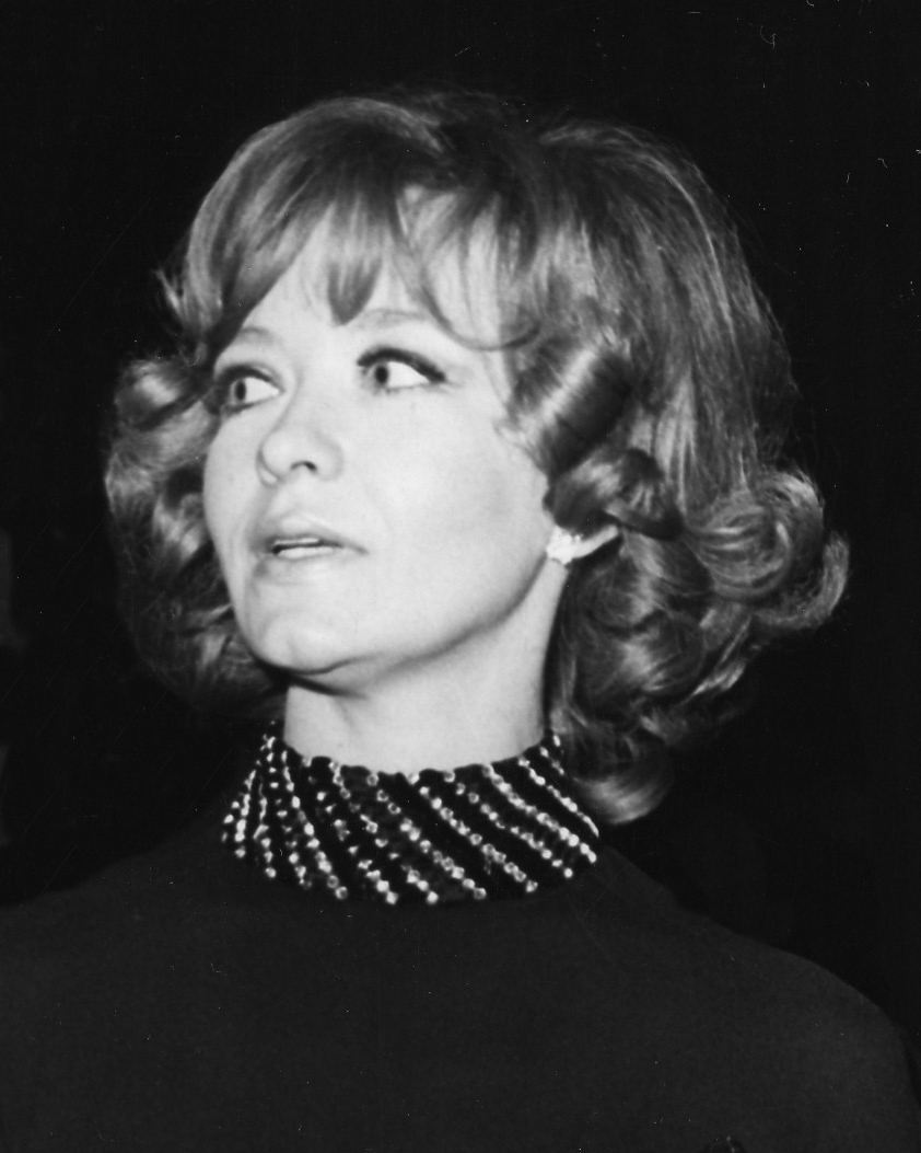 Milena Dravic, Ljubisa Samardzic, Bata Zivoinovic, Bitka na Neretvi, premijera. Autor fotografije Stevan Kragujević (po odobrenju Tanje Kragujević)